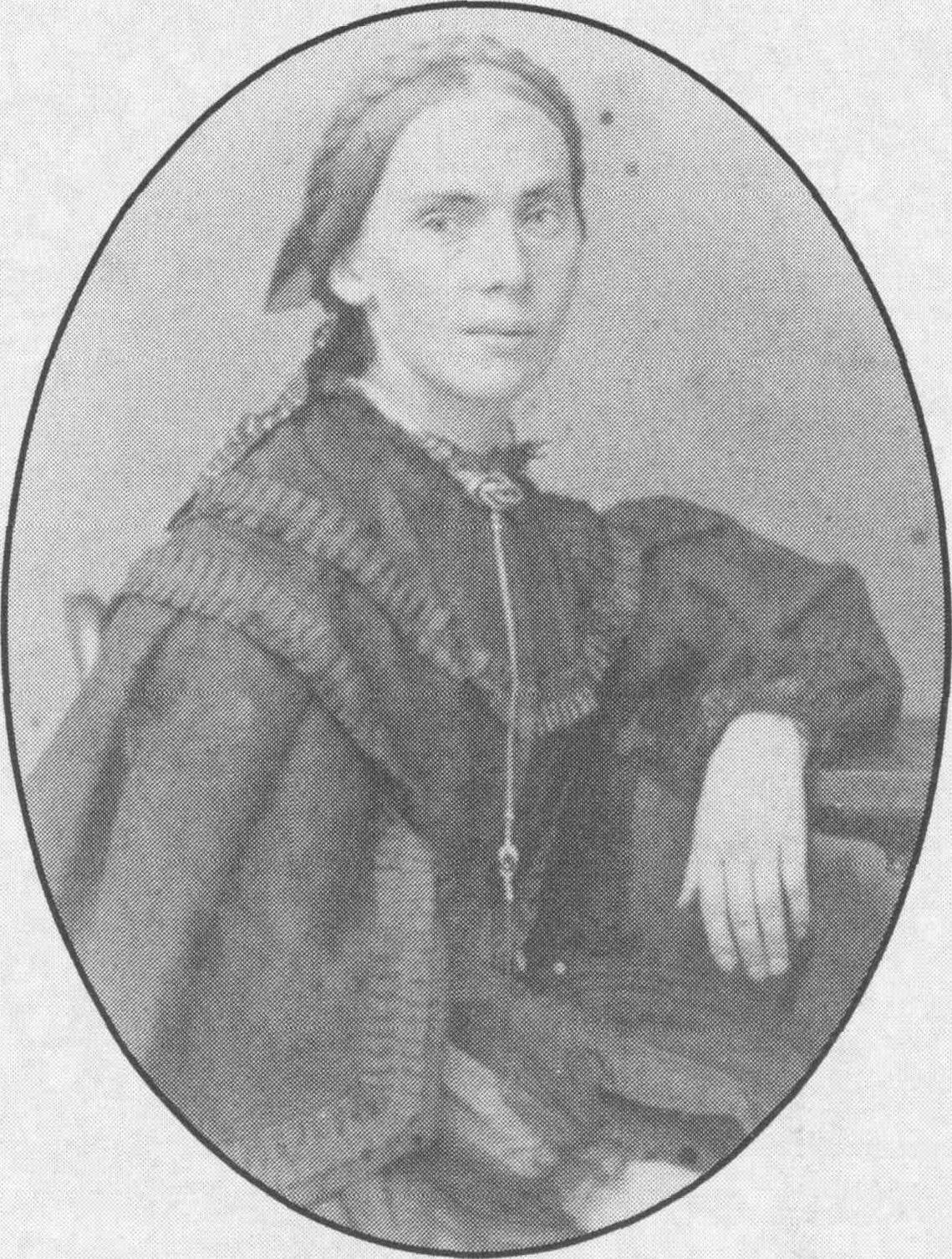 Anna Woyniłłowicz (nazwisko panieńskie: Wańkowicz) - matka Edwarda Woyniłłowicza